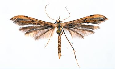 Hellinsia emmelinoida